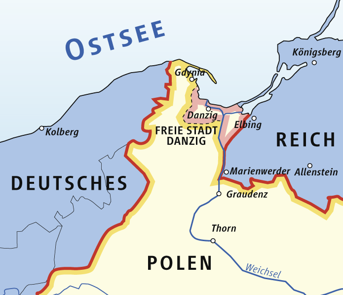 Lage der Stadt Danzig 1937